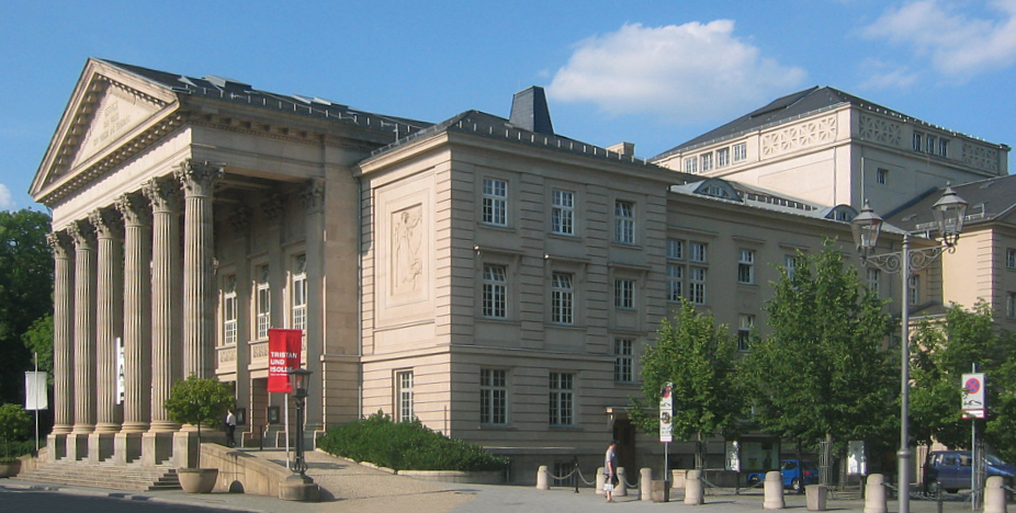 Meiningen Staatstheater, Germany